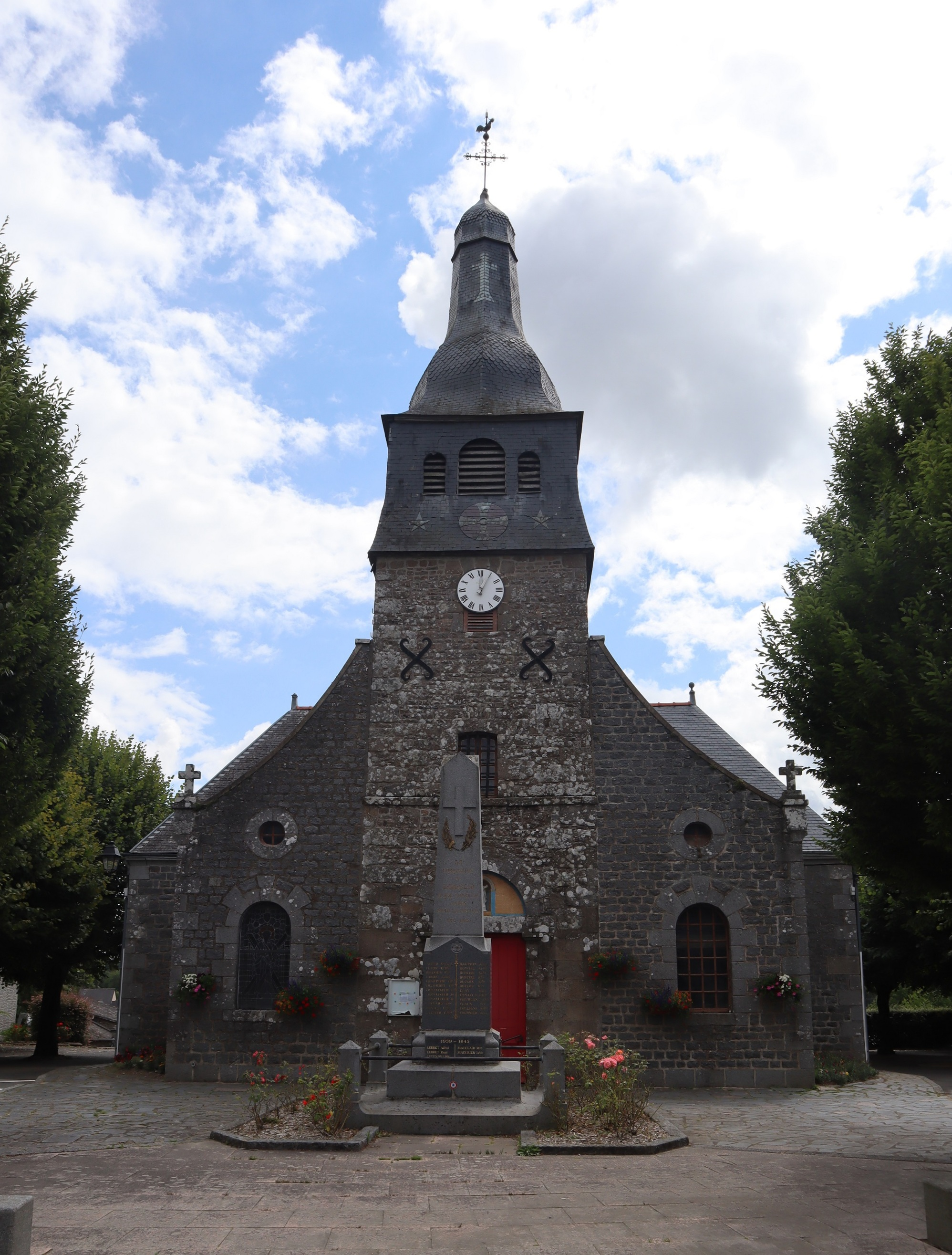 Église Saint-André de Lanhélin (35).